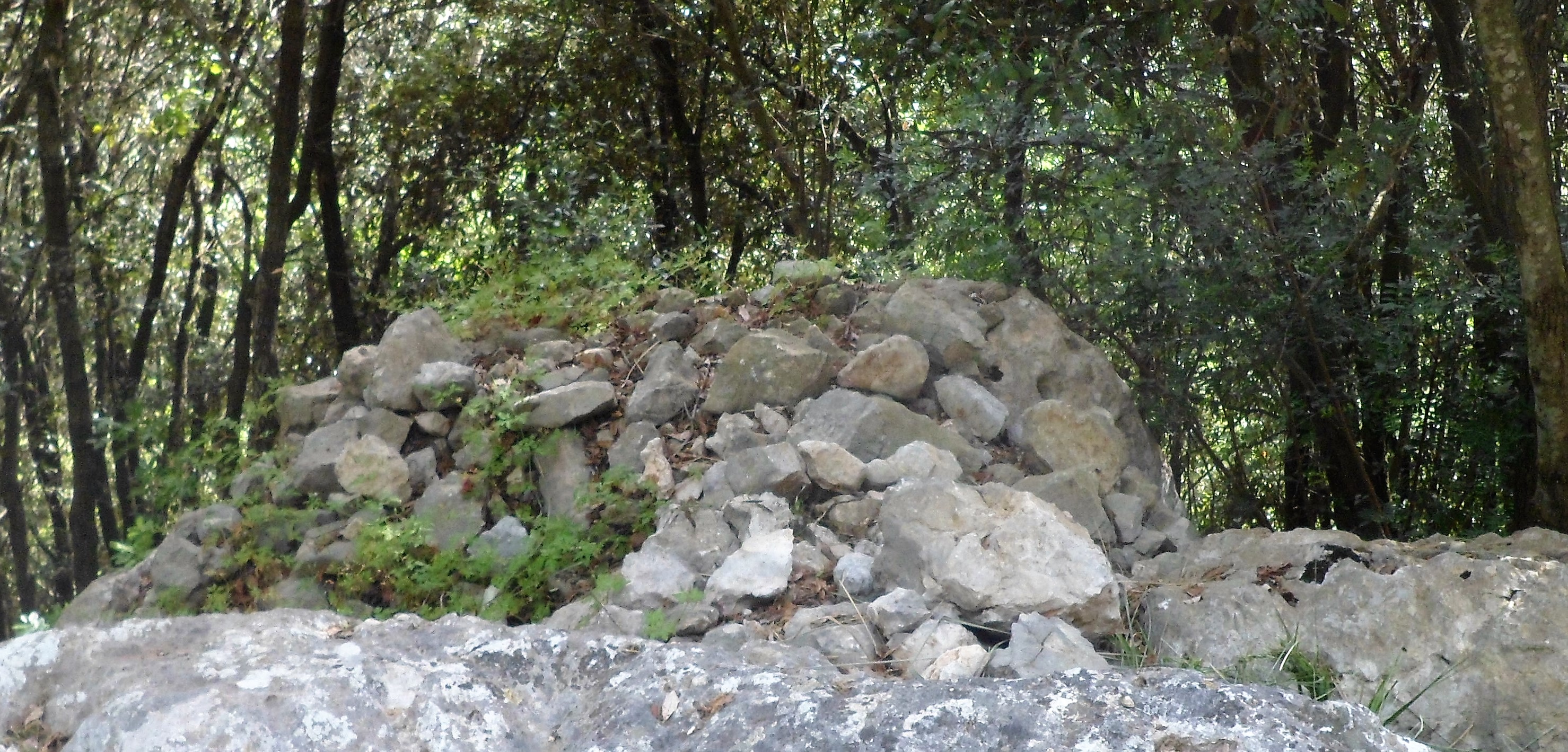 Santuario di Santa Maria a Castello, Formicola, Caserta - Sasso del diavolo